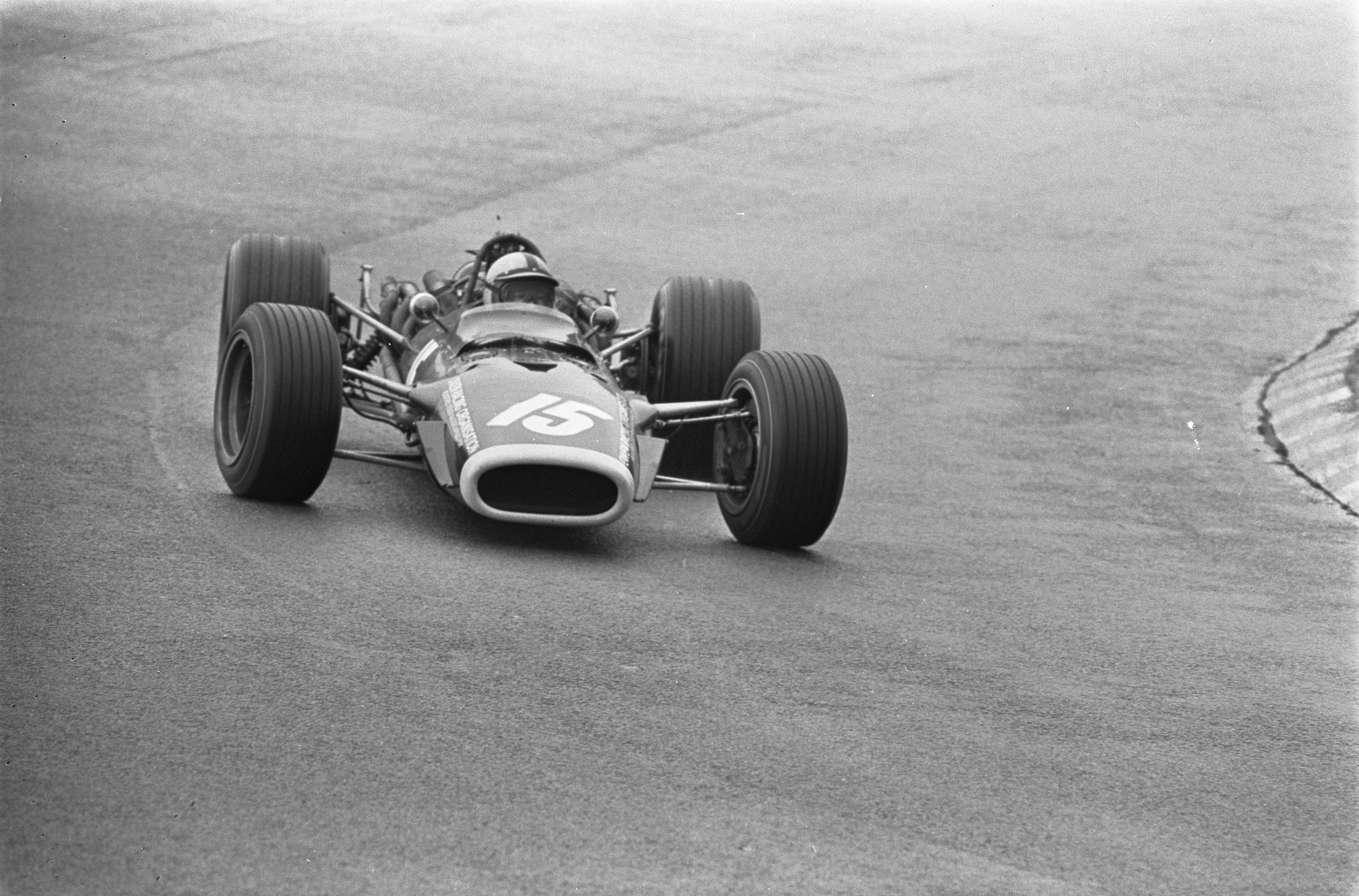 Grand Prix 68 Zandvoort . Nummers 16.17 Pedro Rodriguez (Mexico).